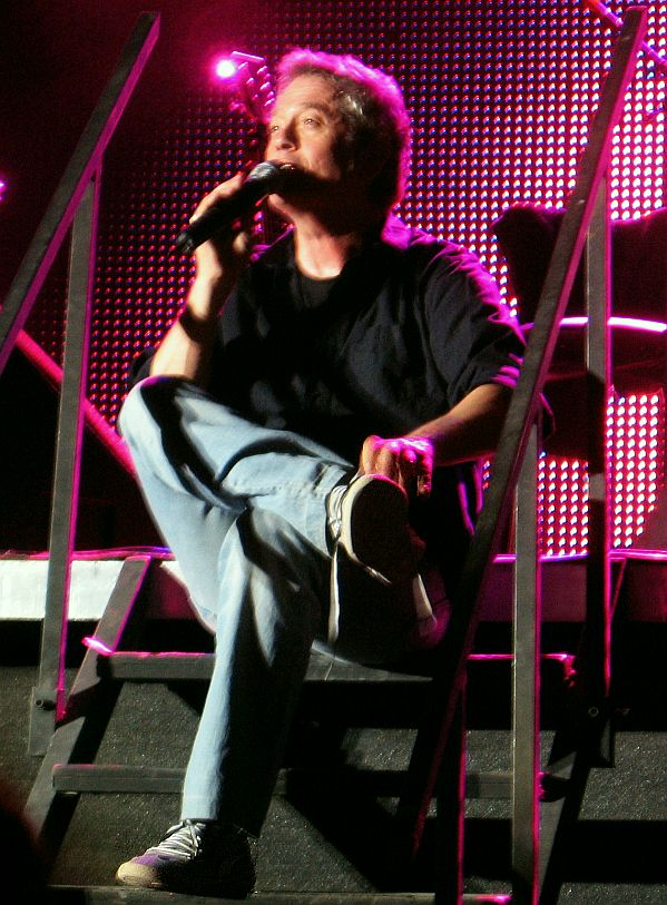 שלמה ארצי